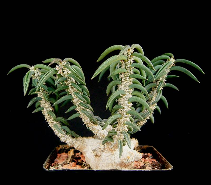 Euphorbia cylindrifolia ssp. tuberifera